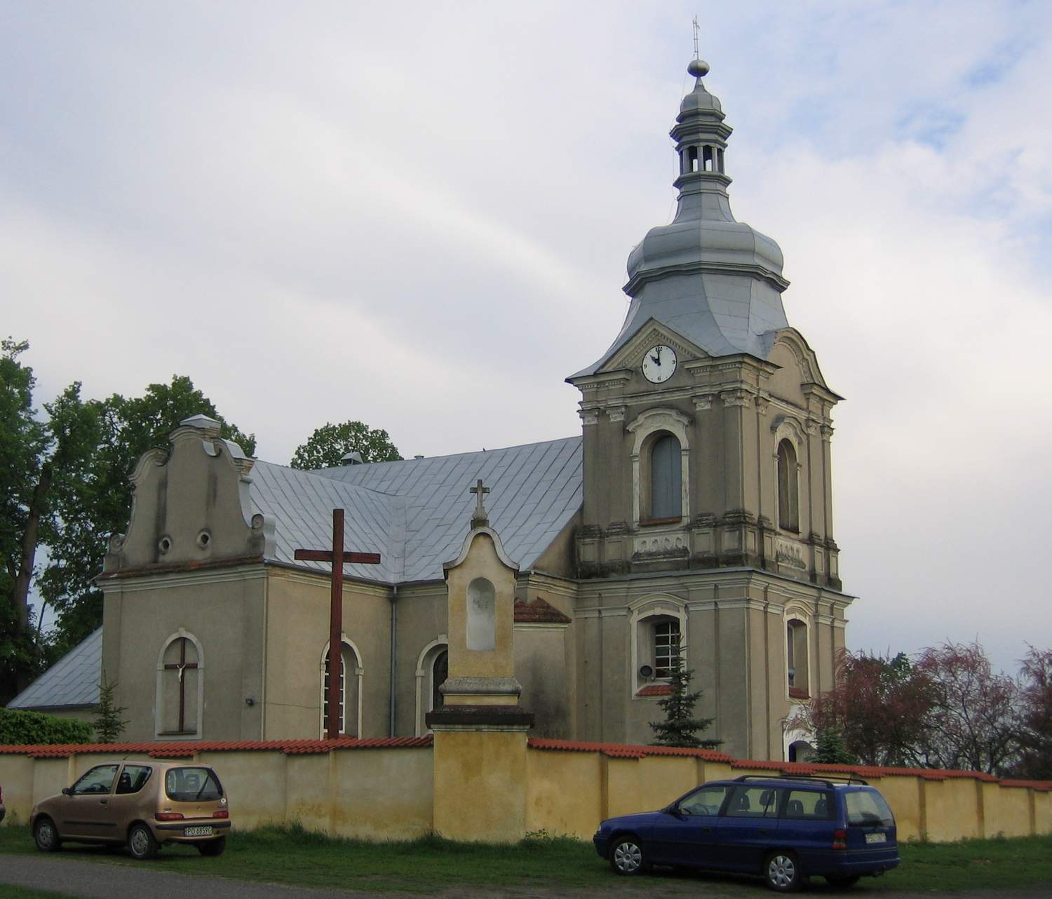 Kościół pw. św. Jana Chrzciciela z 1535r, Ciążeń.